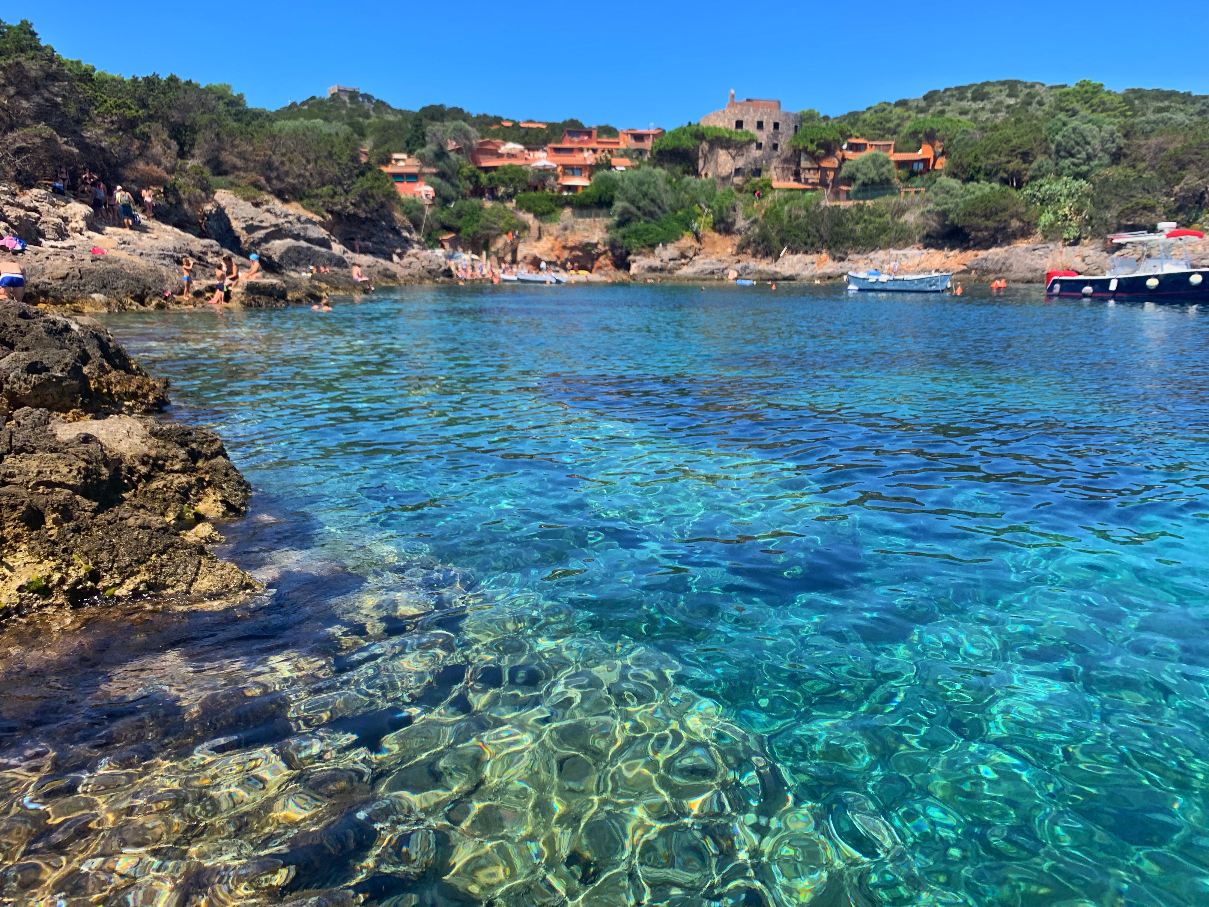 Foto scattata personalmente durante l'estate 2019 sull'Isola di Giannutri, più precisamente a Cala dello Spalmatoio.